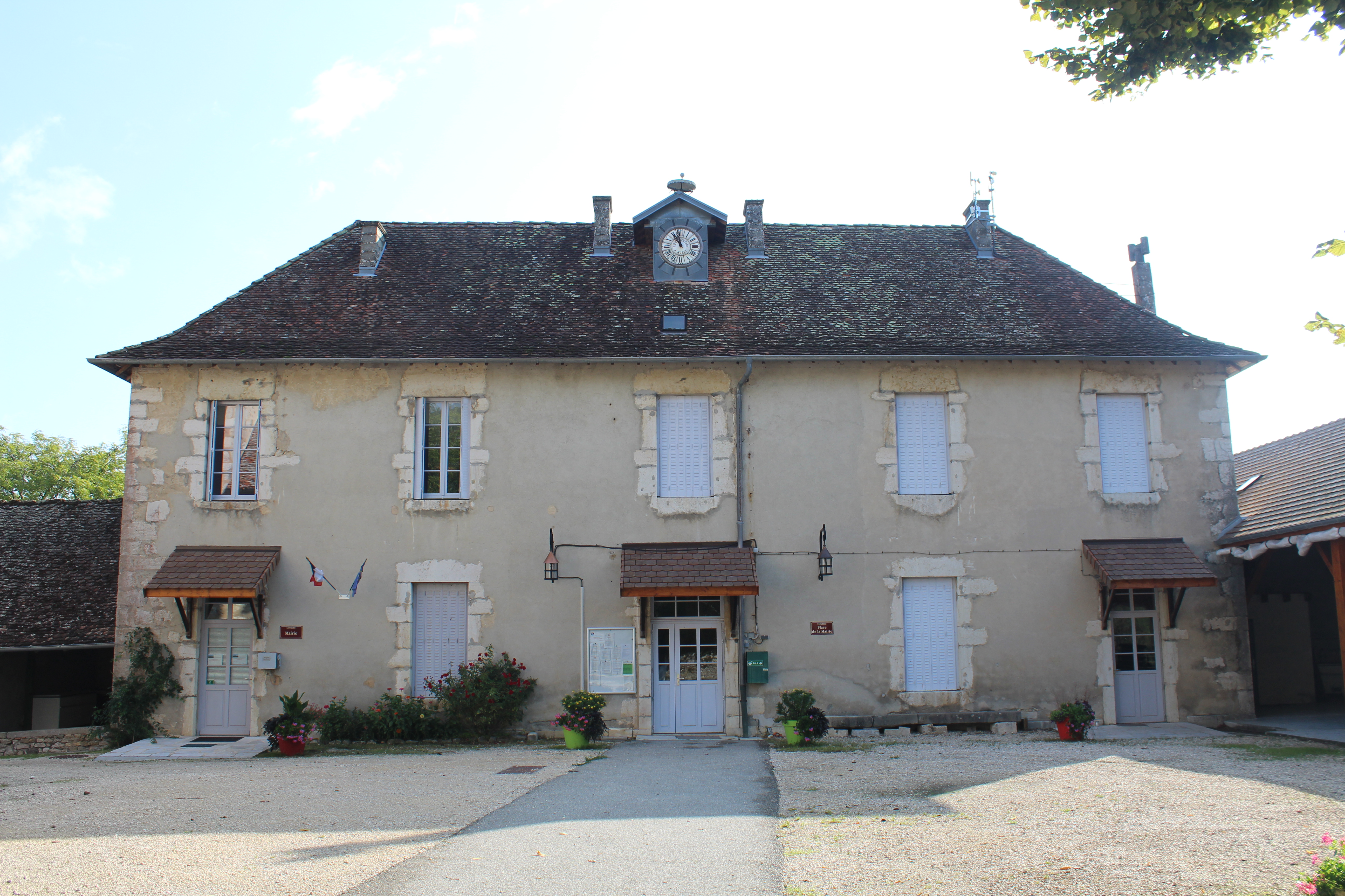 Mairie de Conzieu.